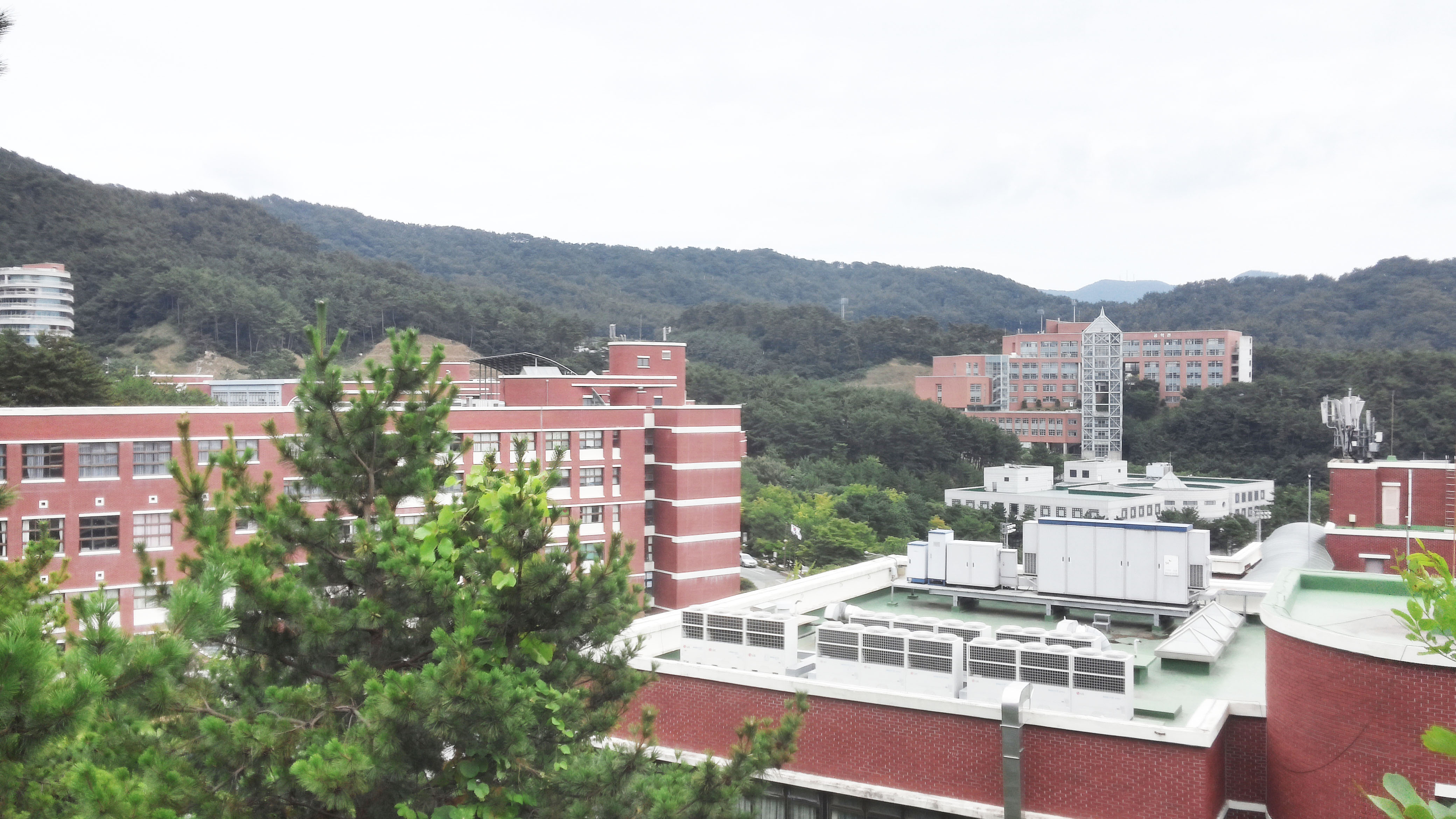 백양캠퍼스 미술관 순환도로에서 공학관 방향